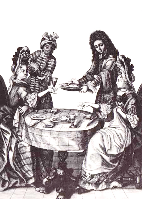 Le midi sous Louis XIV